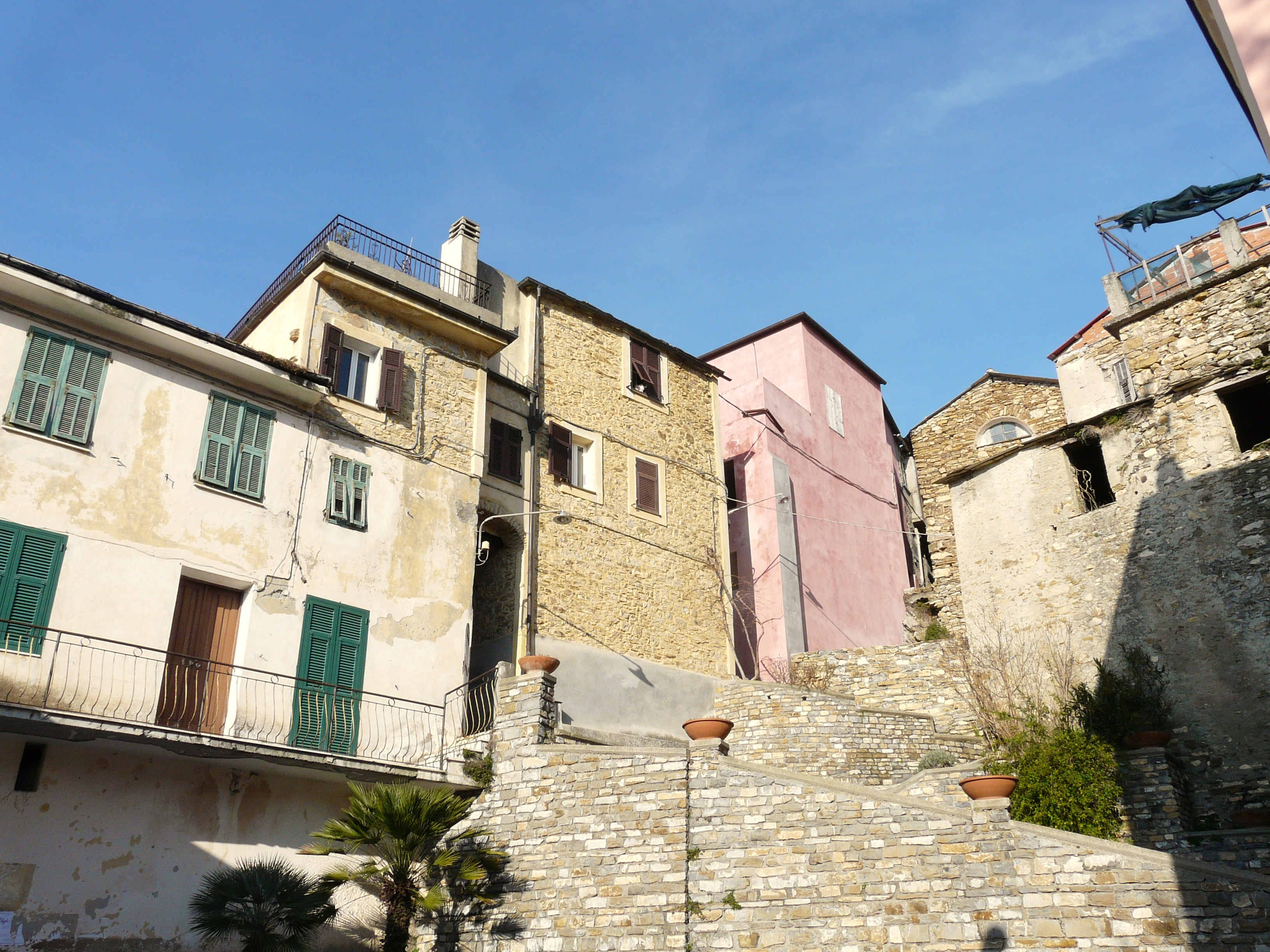 Cesio, Liguria, Italia